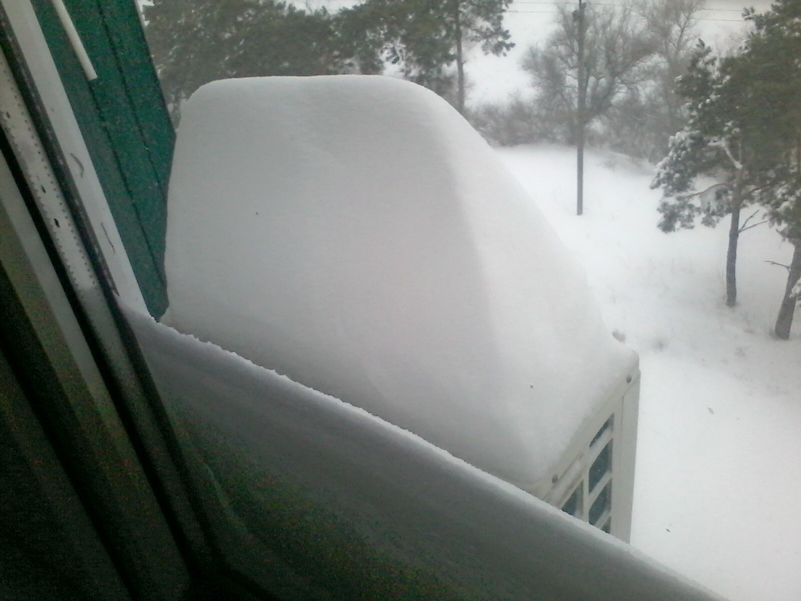 Знято мобілкою Самсунг